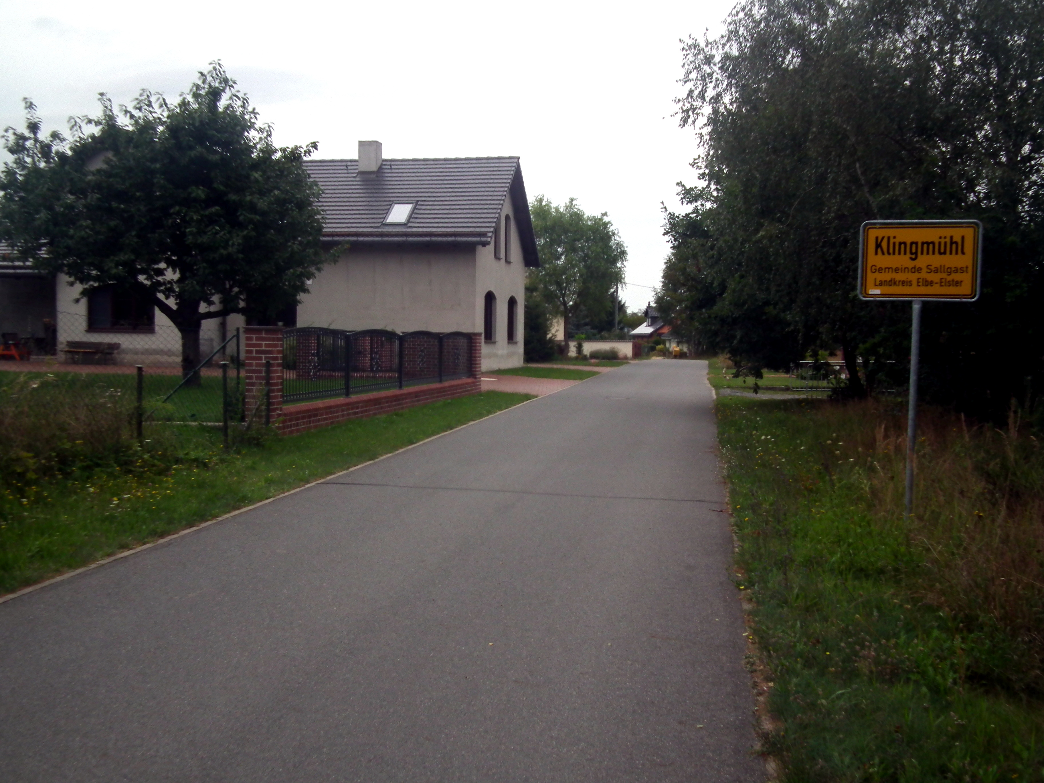 Klingmühl, Sallgast, Brandenburg, Deutschland